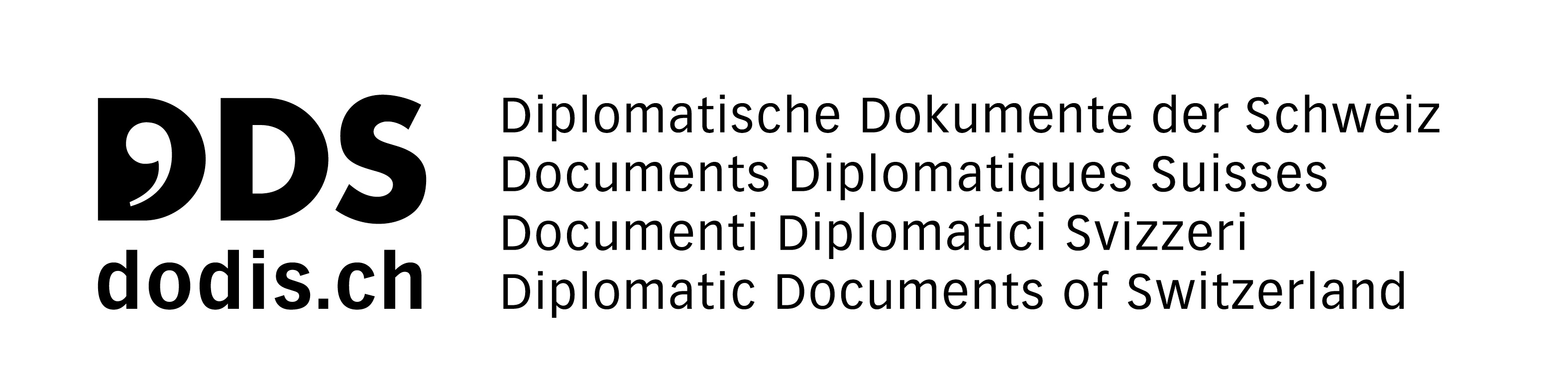 Logo DDS/dodis.ch